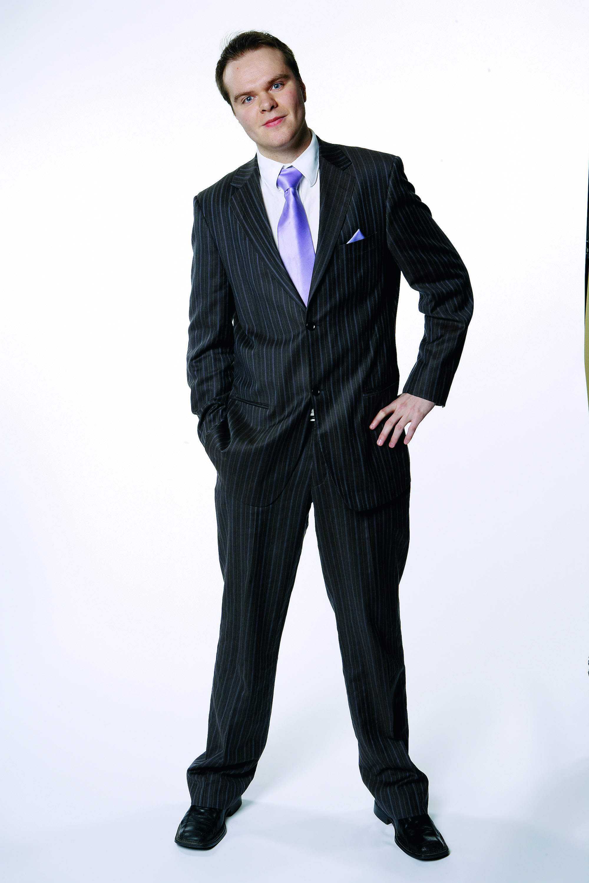 Ove André Vanebo, FrP-politiker